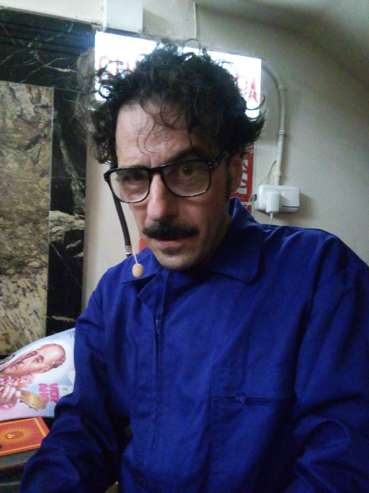 El humorista e ilustrador hispano-argentino Darío Adanti tras el show mongocircense "Mongolia sobre hielo" en Valladolid (2018).